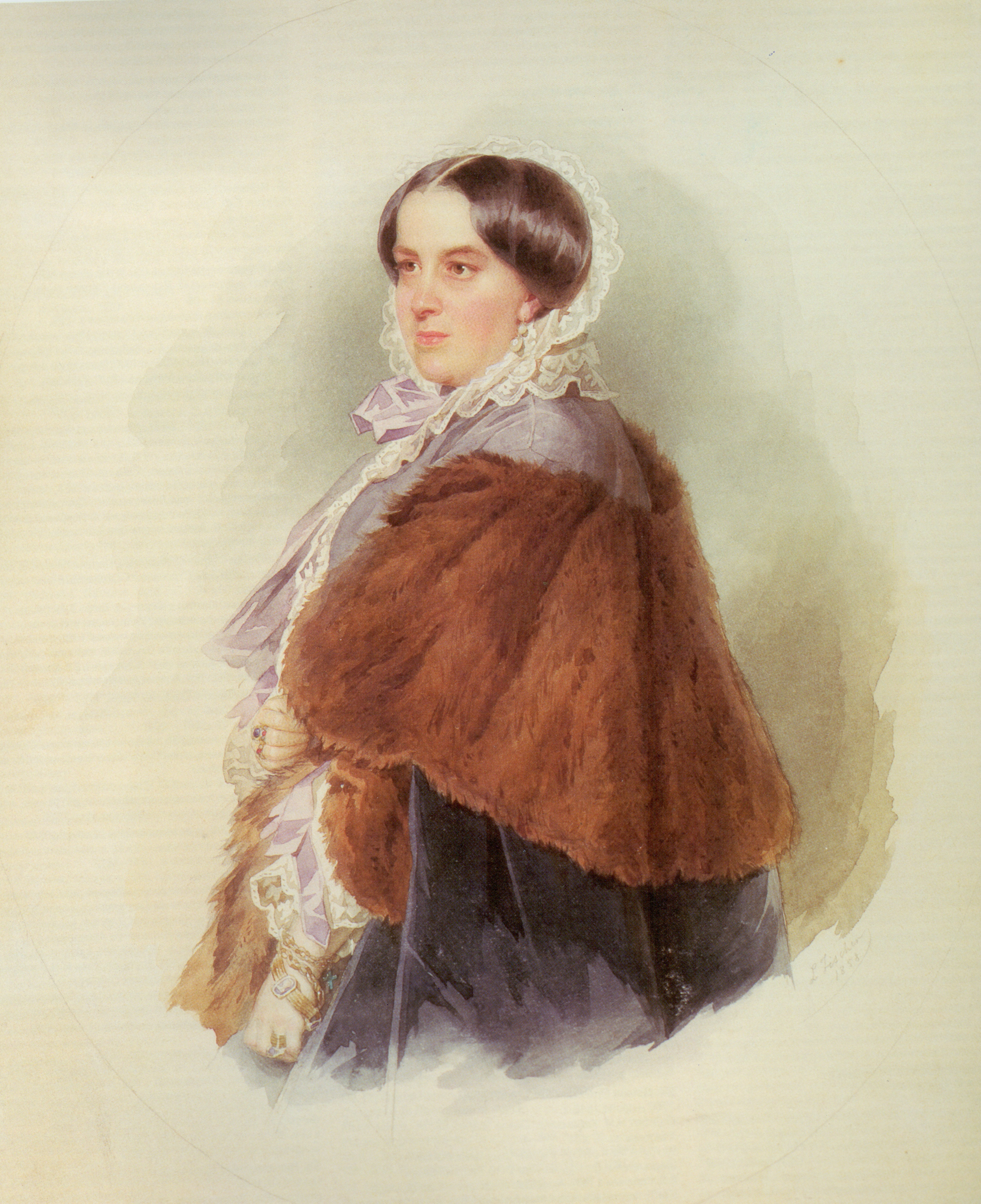 Княжна Варвара Николаевна Репнина-Волконская (1808-1891)